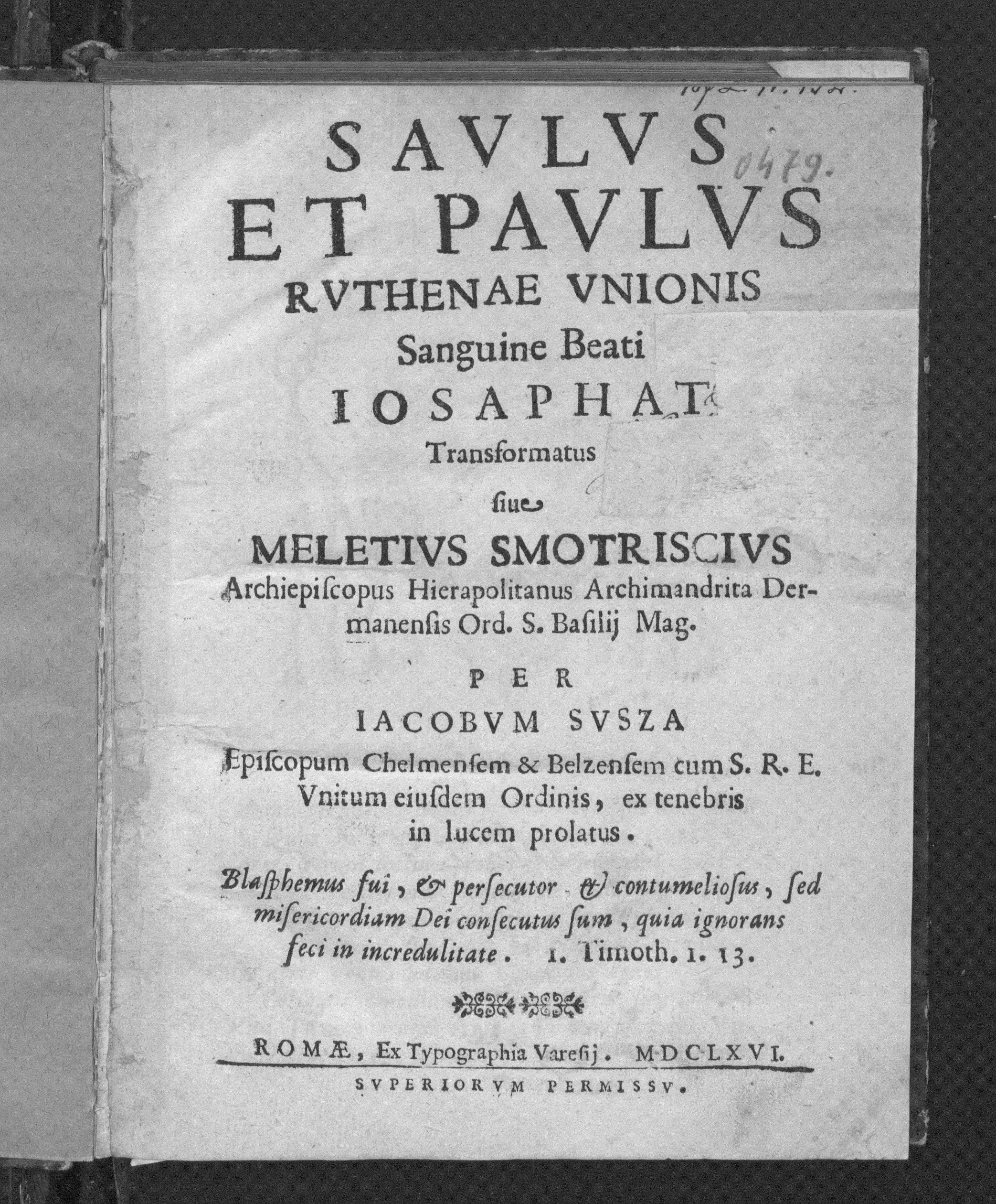 Jacobus Susza, Saulus et Paulus ruthenae unionis... sive Meletius Smotricius, Romae 1666.